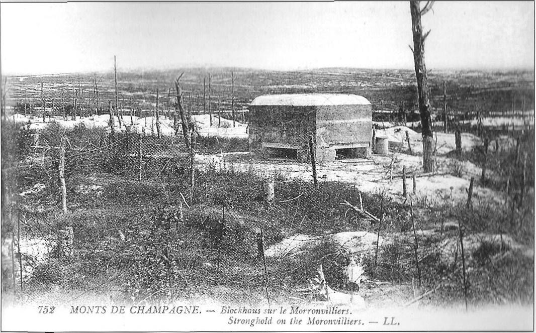 Carte postale ancienne des Monts de Champagne . Sur le Mont Cornillet un blockaus .